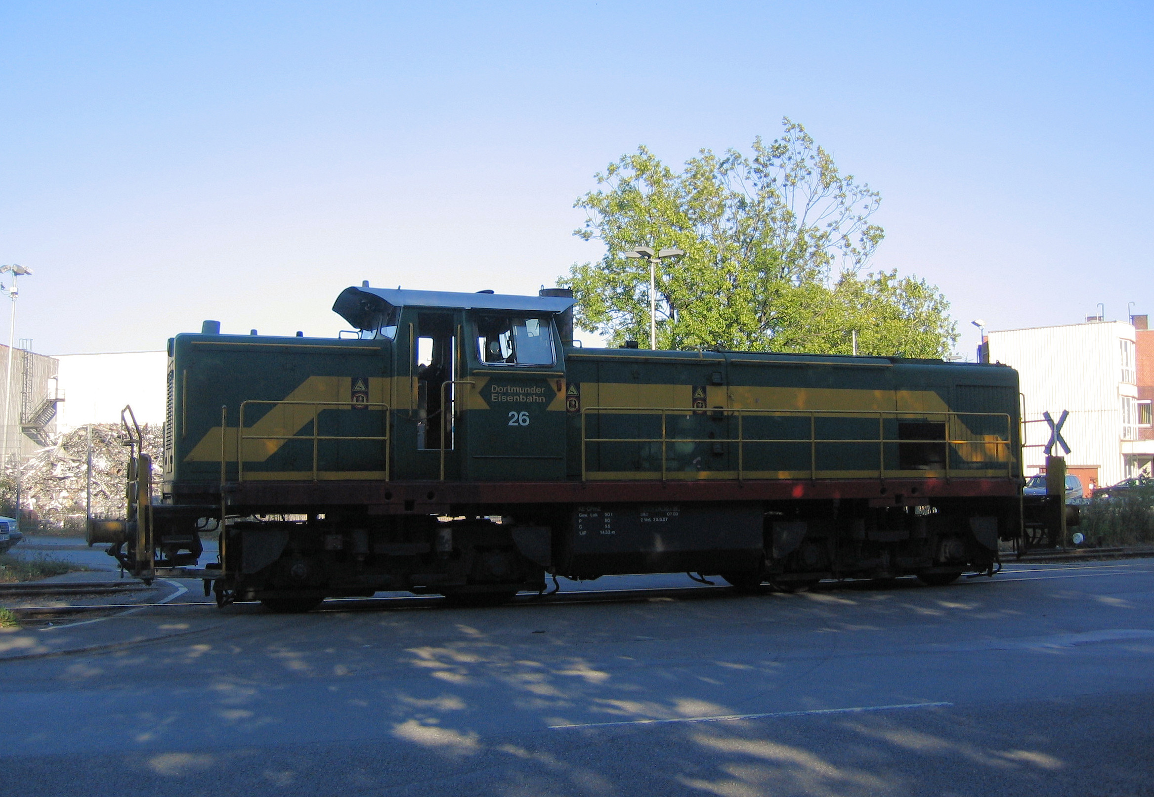 Diesellok der Dortmunder Eisenbahn Eigene Aufnahme September 2006